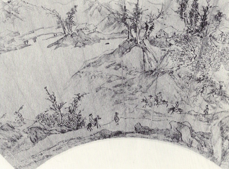 Paysage. Ensemble et détail d'un éventail. Couleurs sur papier d'or. H: 18cm; L: 50cm. par le peintre chinois Wen Boren (1502-1575 ou 1588).Musée Guimet. Paris.